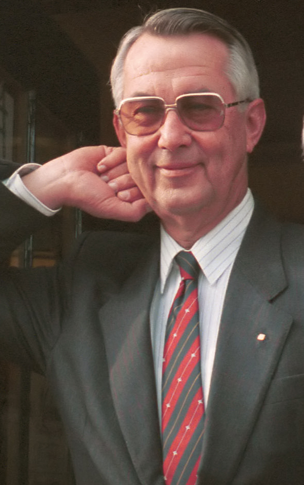 Albert en Gerrit-Jan Heijn bij de museumwinkel aan de Zaanse Schans